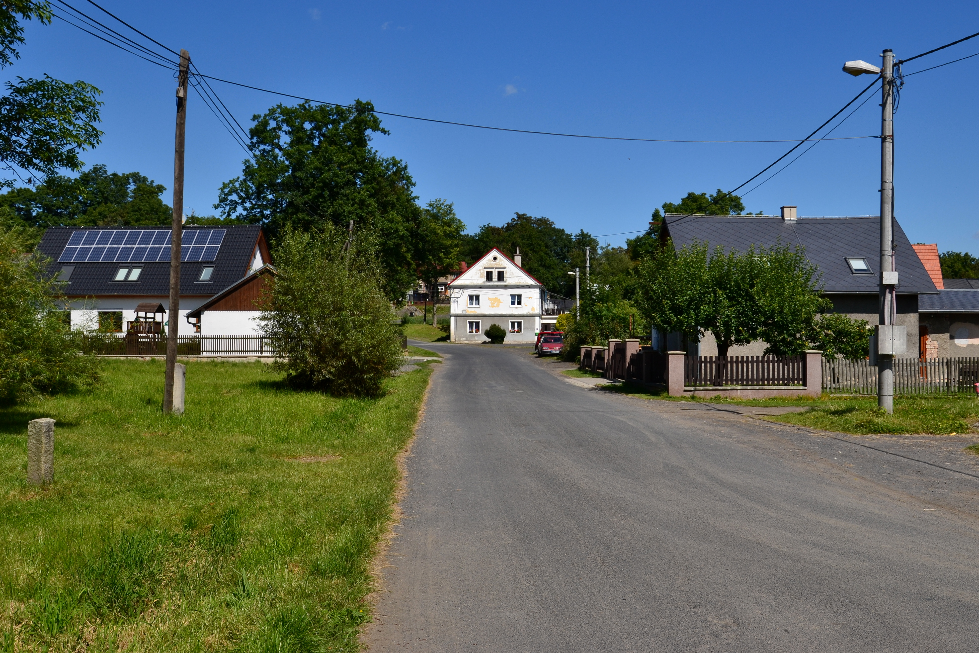 Střední část vesnice